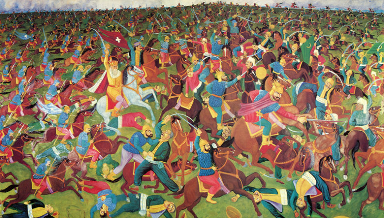 Brašić Janko, Kosovski boj,b. g.ulje-platno,205x415 cm